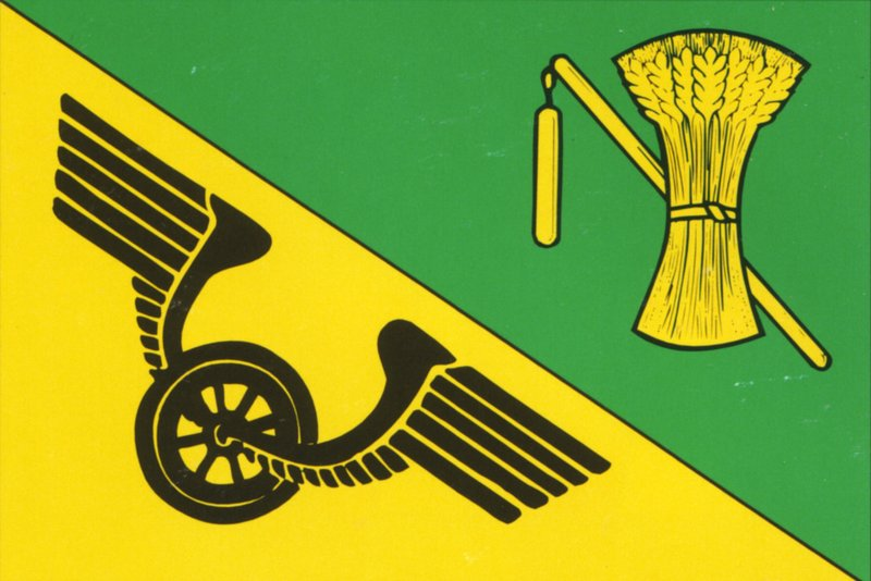 Flag of Svinov.